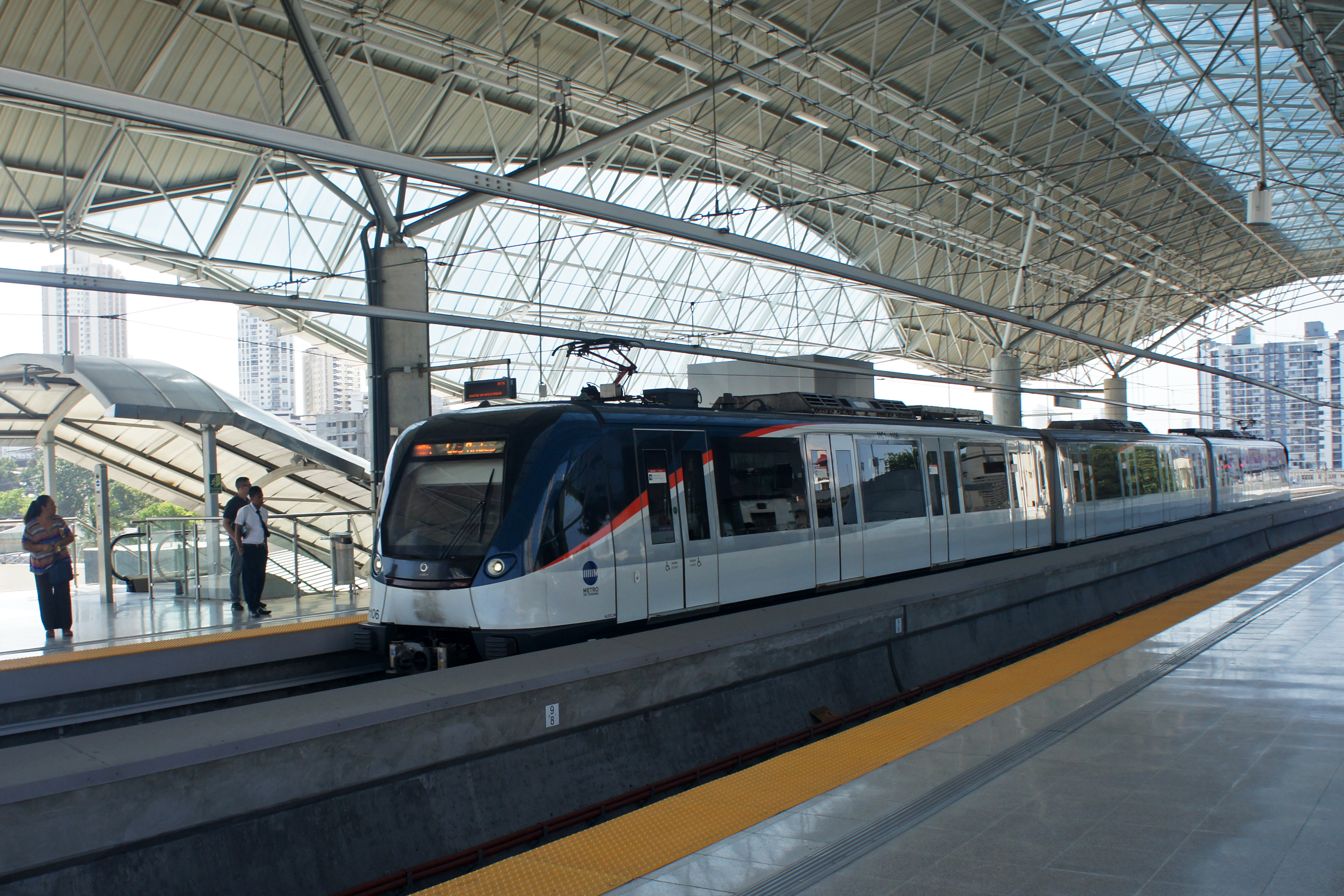 Estación 12 de Octubre, Metro Panamá.